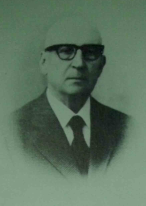 Ing. Filippo Zapata